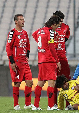 علی کریمی کاپیتان پرسپولیس، سید جلال حسینی و رضا حقیقی / پرسپولیس ۴ - نفت تهران ۱ -مرحله یک‌هشتم نهایی بیست و ششمین دوره رقابتهای فوتبال جام حذفی- دی ۱۳۹۱